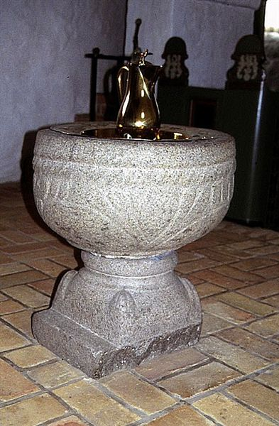 Vindum Kirke, Viborg Kommune, døbefont